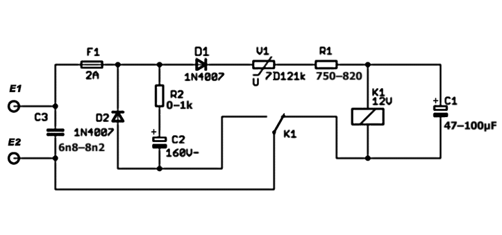 Schnellstarter für Leuchtstofflampen mit Relais.